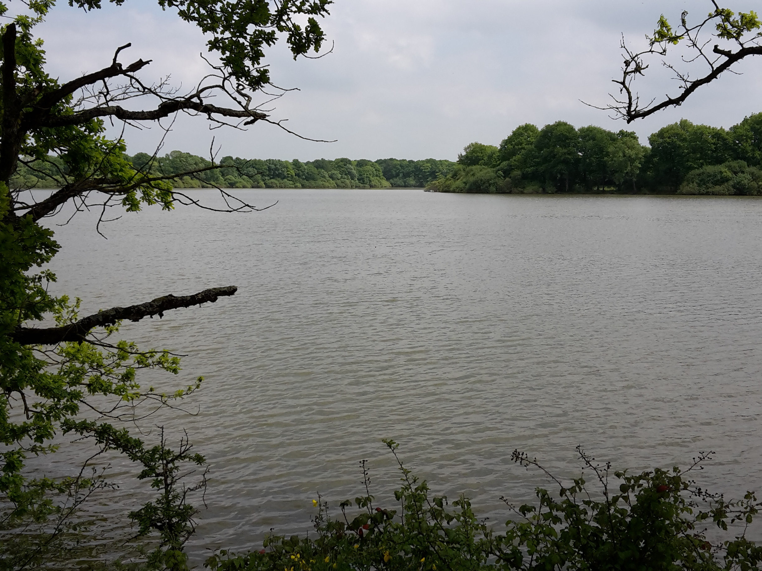 Etang du Pin, Le Pin, Loire-Atlantique, France.